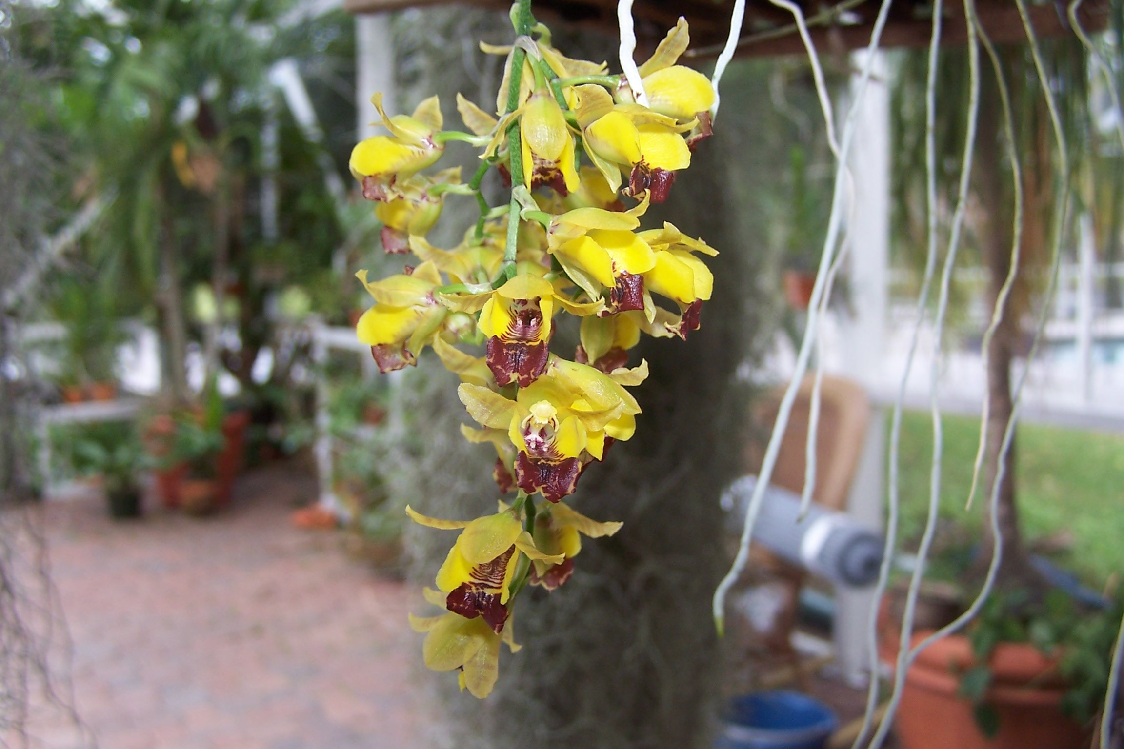 Baptistonia echinata